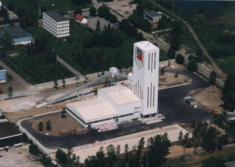 Baumit Betonelemgyár, Alsózsolca